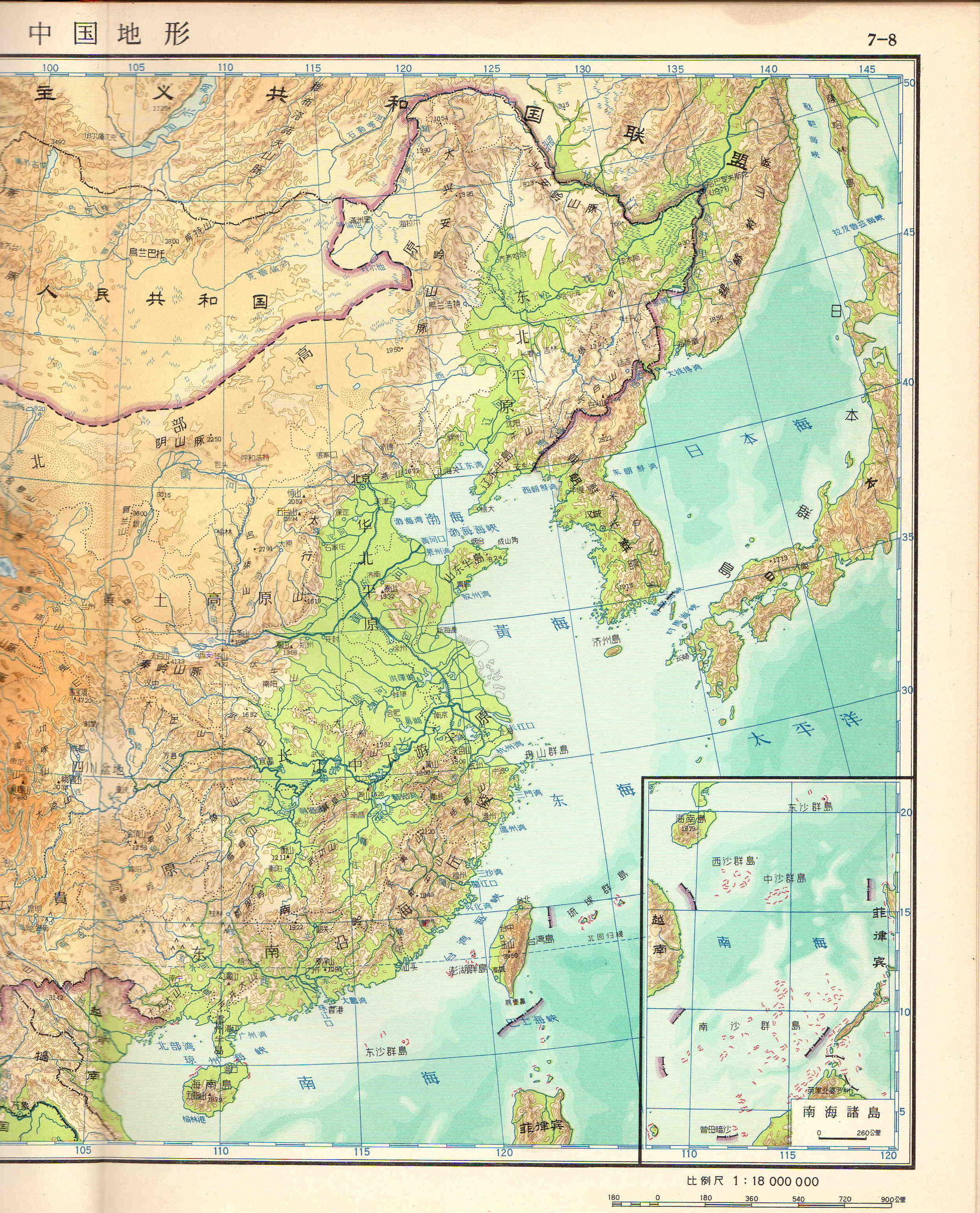 中国北京市にある地図出版社が1958年に出版した「中国人民共和国地図集」の中国国土の東半分を描く8頁をスキャンしたもの